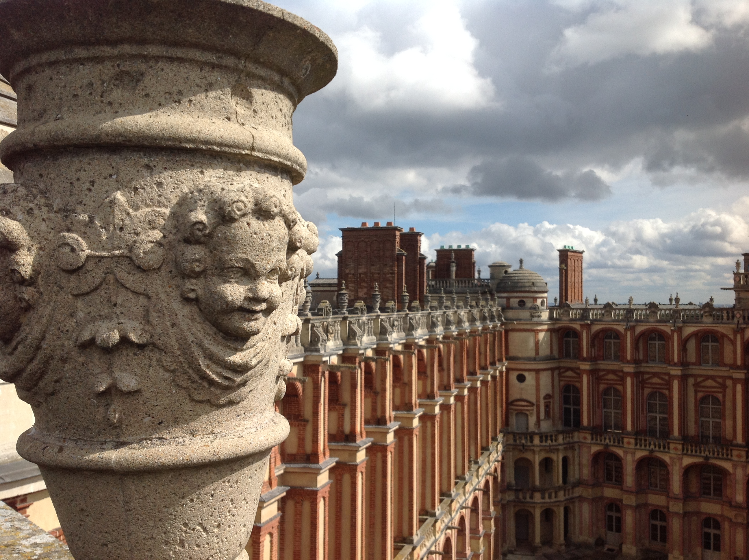 Cour intérieure du Château de Saint-Germain-en-Laye vue des toîts, accueillant le Musée d'archéologie nationale, France, Yvelines, 2016 - Photo prise par Louise Merzeau